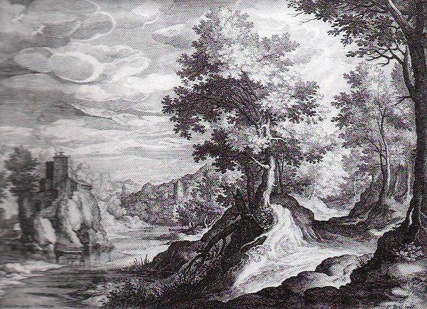 Johan Sadeler I., Landschaft, Kupferstich